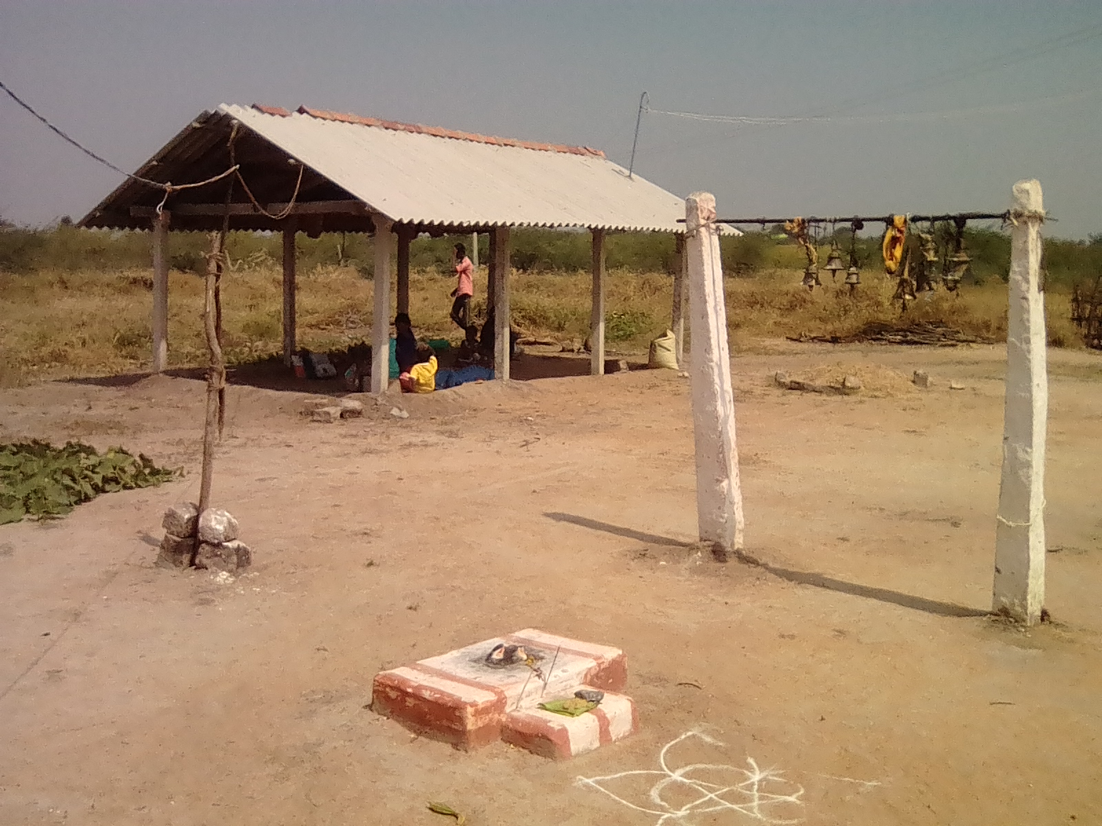 வரலாற்று ஆவணம் புகை படம்